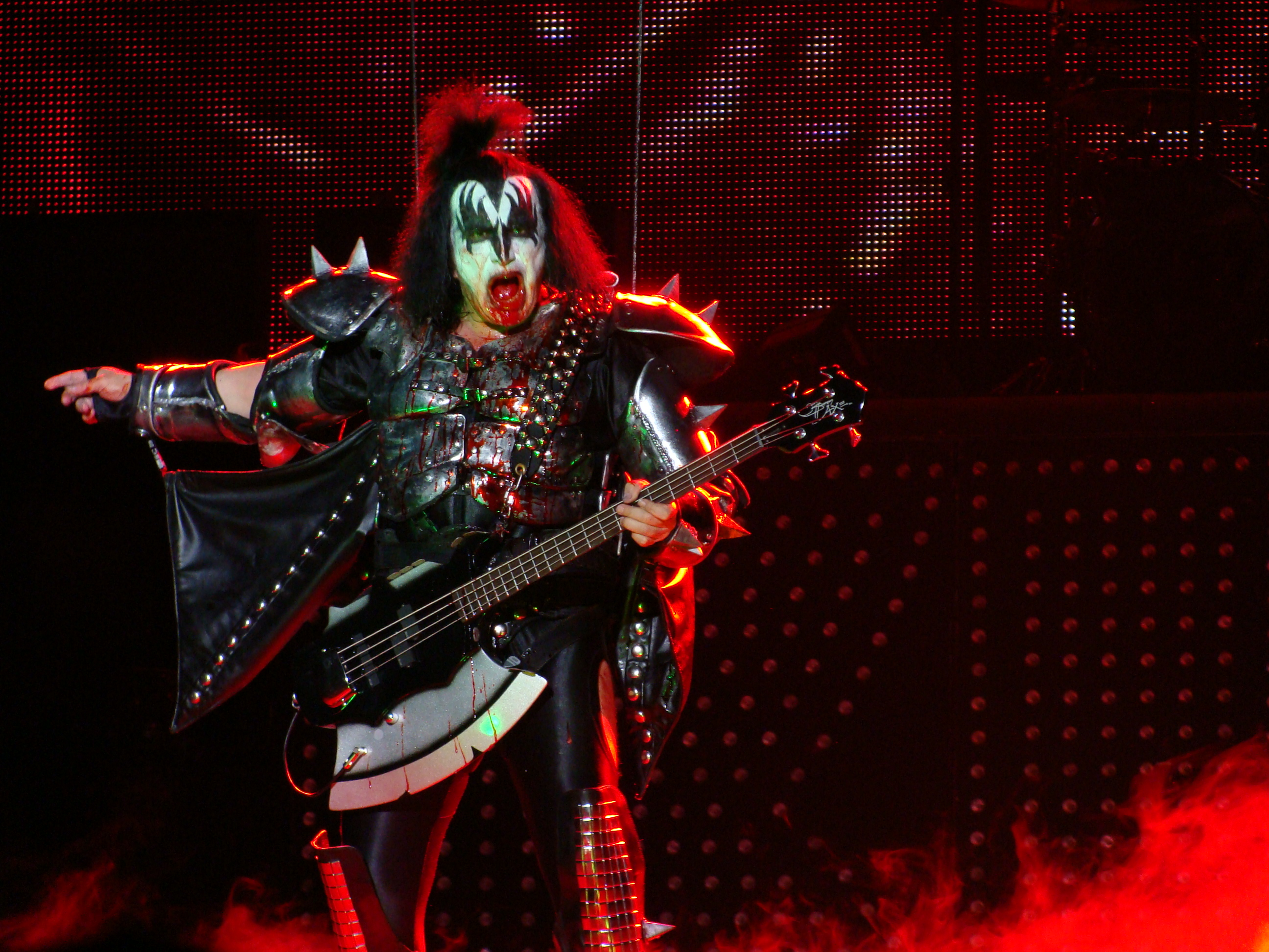 Gene Simmons, en una actuación del grupo KISS en Vitoria-Gasteiz, en el Azkena Rock Festival 2010.